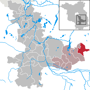 Jamlitz in Brandenburg (Country) - District Dahme-Spreewald